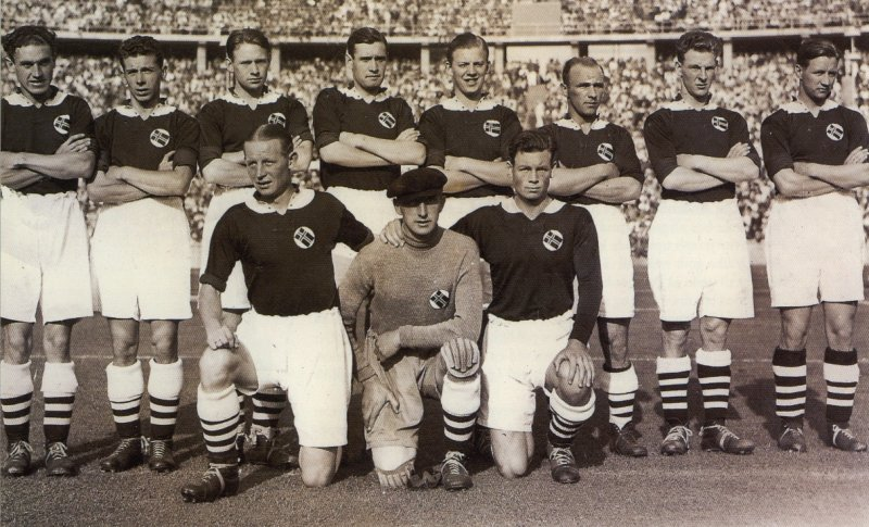 Det berømte Bronselaget fra OL 1936. Bak fra venstre: Arne Brustad, Magnar Isaksen, Reidar Kvammen, Fritjof Ulleberg, Rolf Holmberg, Alf Martinsen, Odd Frantzen, Jørgen Juve. Foran fra venstre: Nils Eriksen, Henry Johansen, Øivind Holmsen. Foto: Scanpix. Hentet fra boken «100 år med norsk fotball» (ISBN 82-496-0090-8) Begrunnelse: se diskusjonssiden.